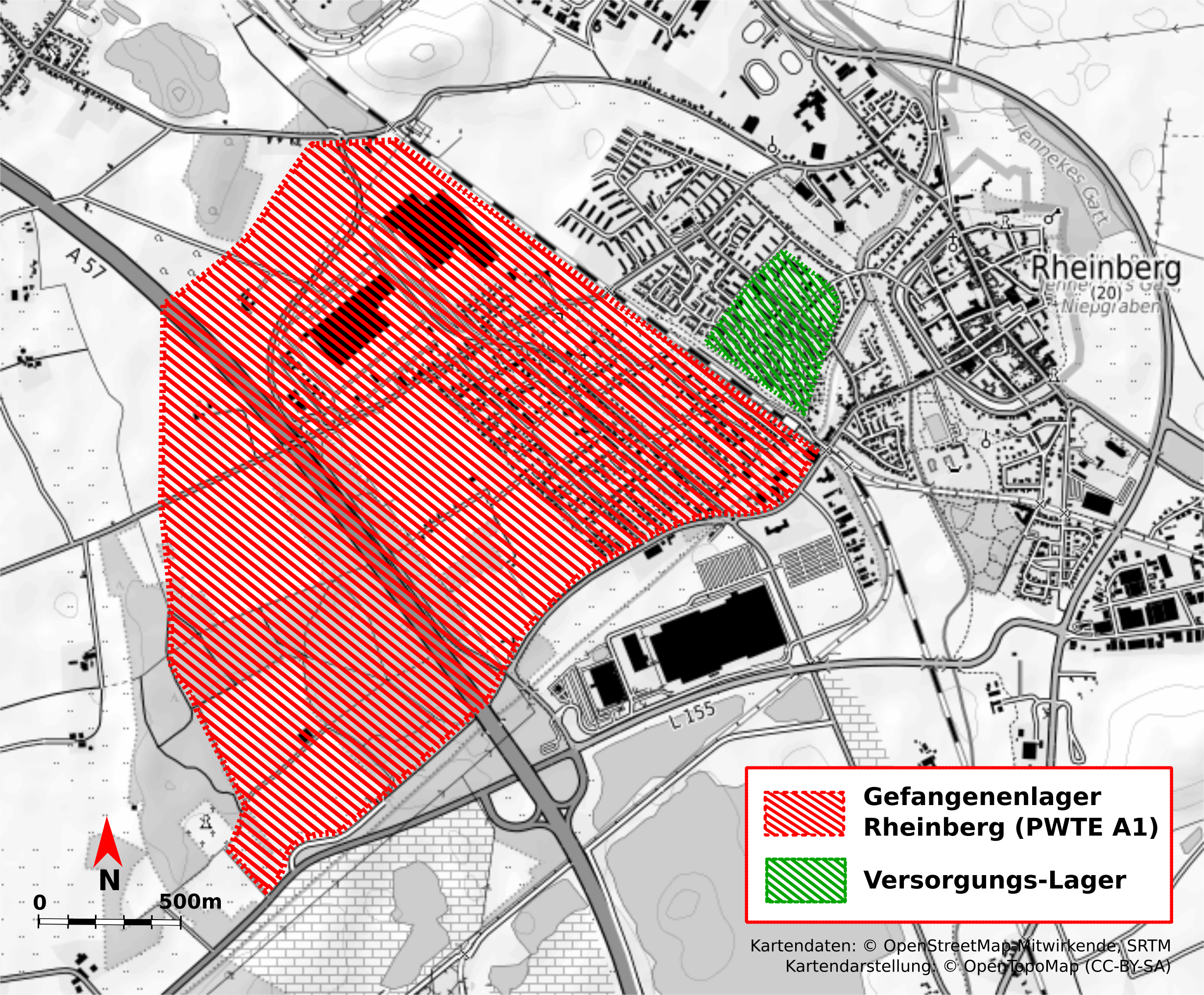 Lage des Kriegsgefangenenlagers Rheinberg (PWTE A1) auf einem aktuellen Stadtplan. Es existierte von April bis September 1945. Heute ist es ein Bodendenkmal.